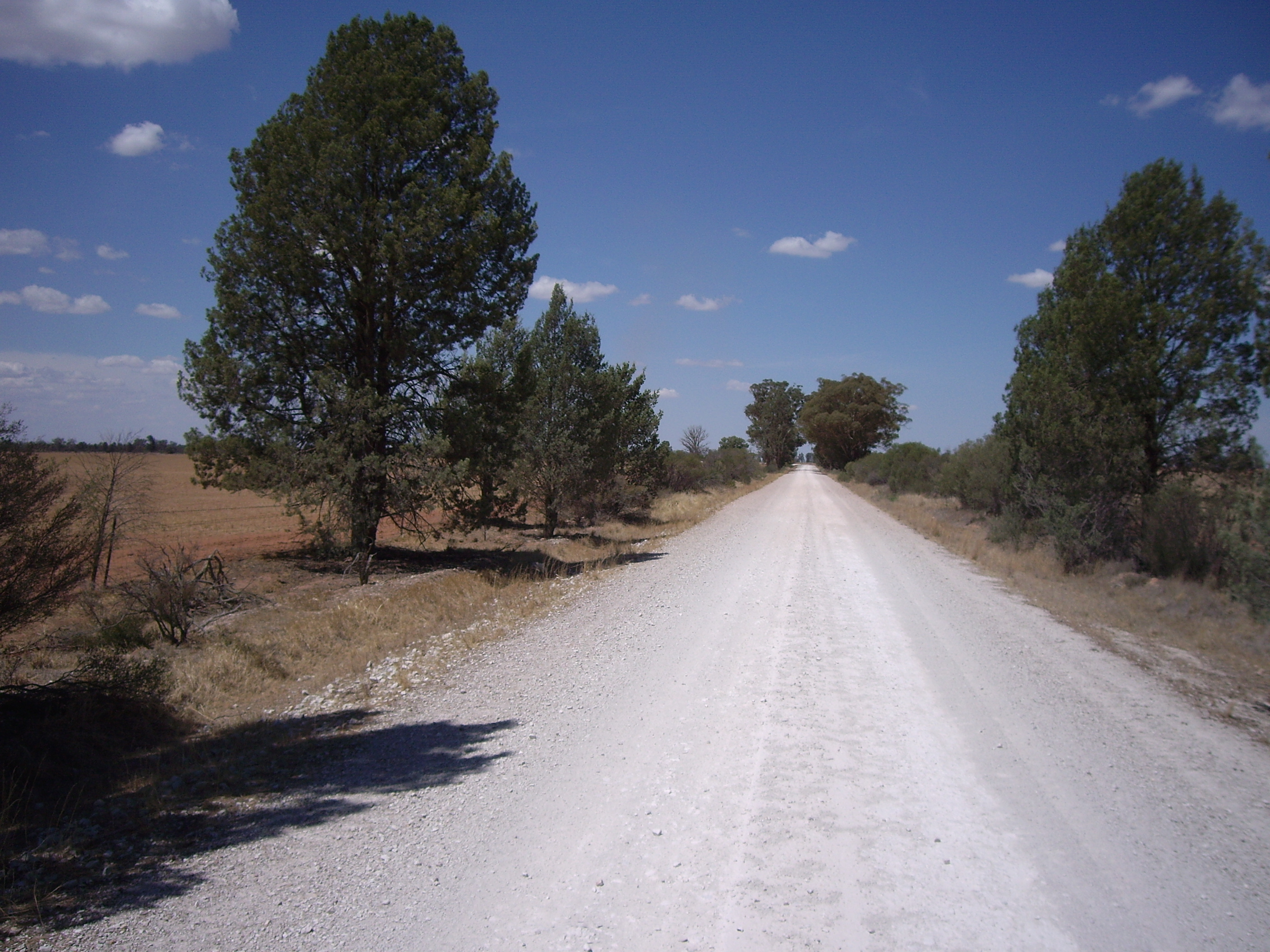 Birrego to Sandigo Road